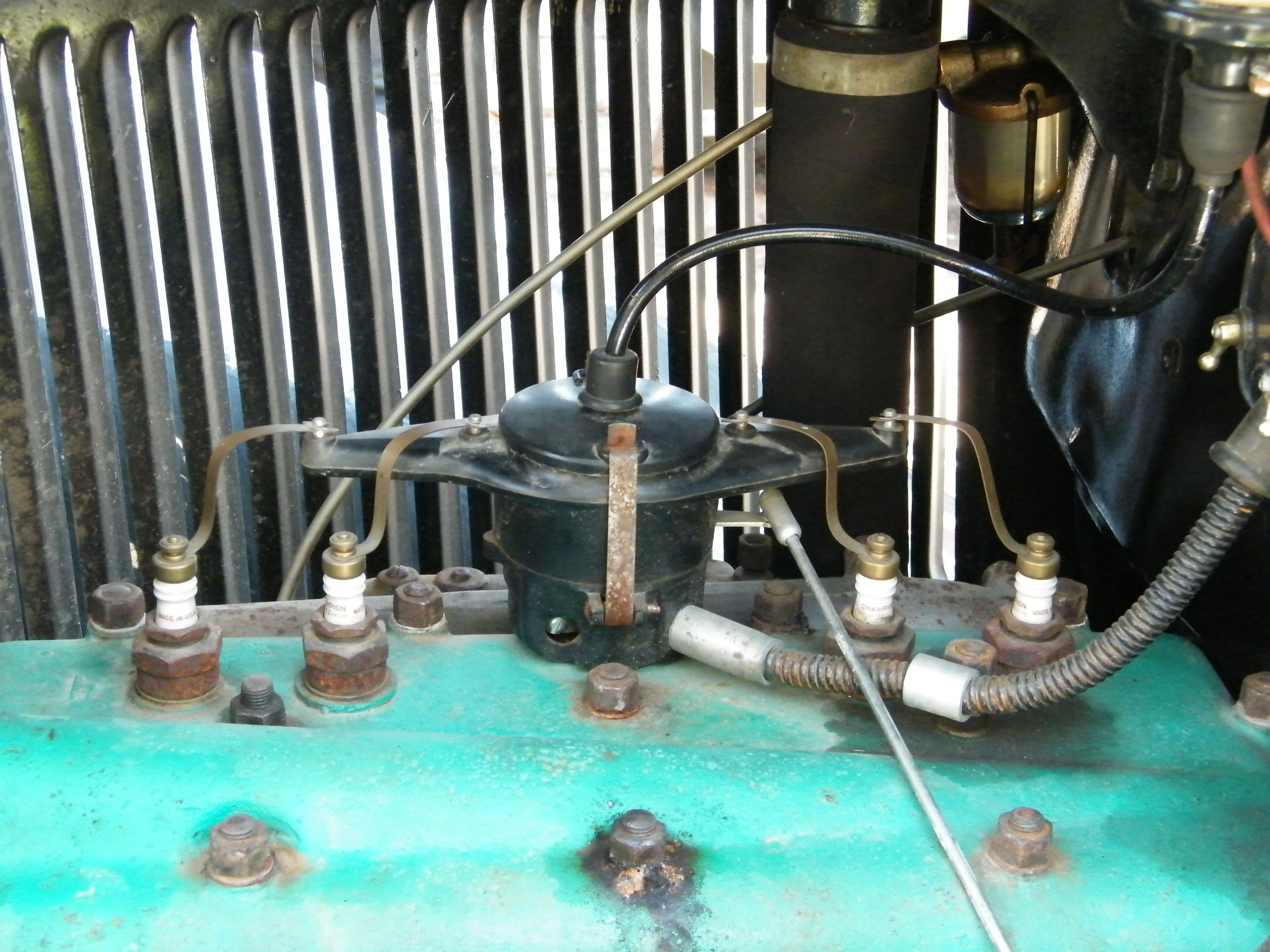 Двигатель ГАЗ-АА